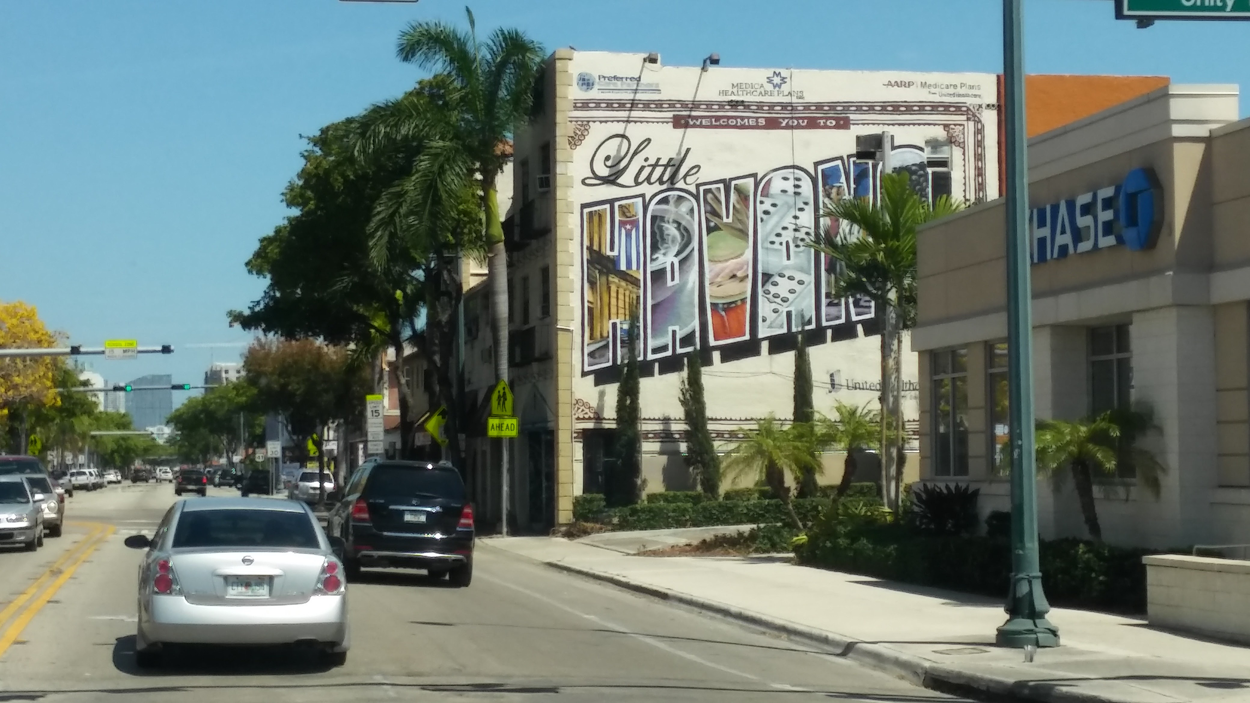 Little Havana Entrance.